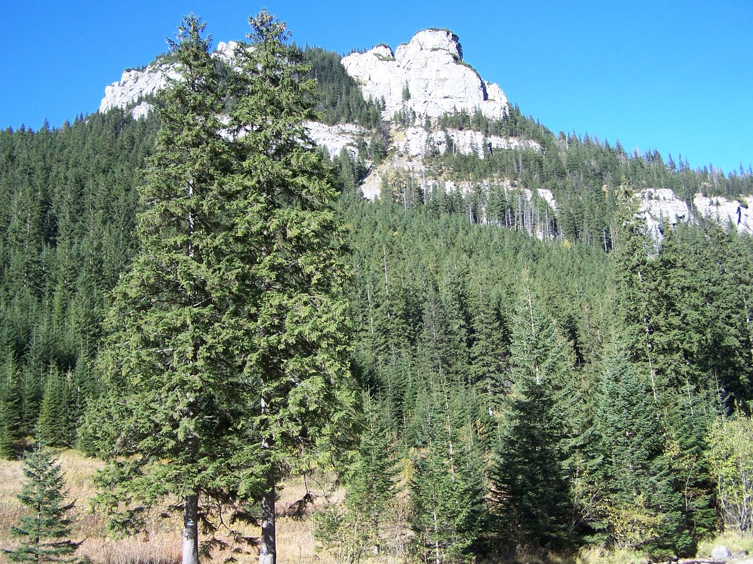 Regiel górny w górnej części doliny Kościeliskiej w Tatrach. Data wykonania zdjęcia::2005-10-12 Autor:Opioła Jerzy